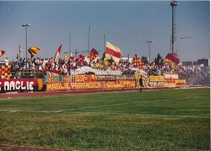 Gradinata Est nei primi anni '90